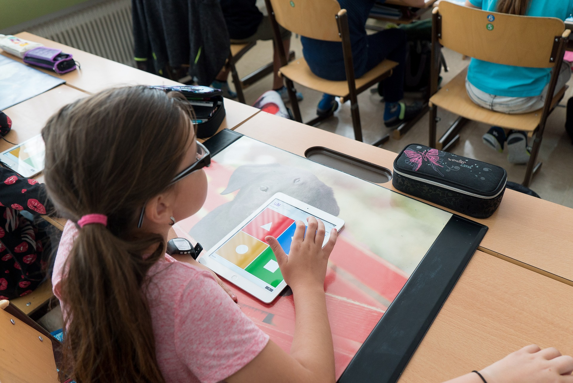 Estudiante participando en una prueba de Kahoot! para reforzar su aprendizaje.